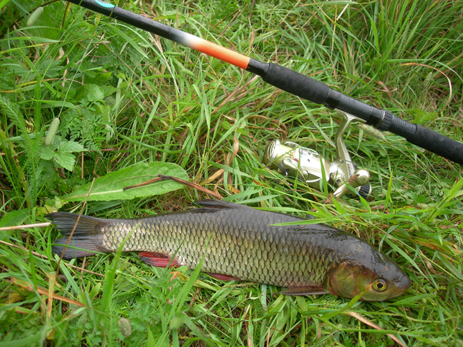 Leuciscus cephalus (L.), Turb